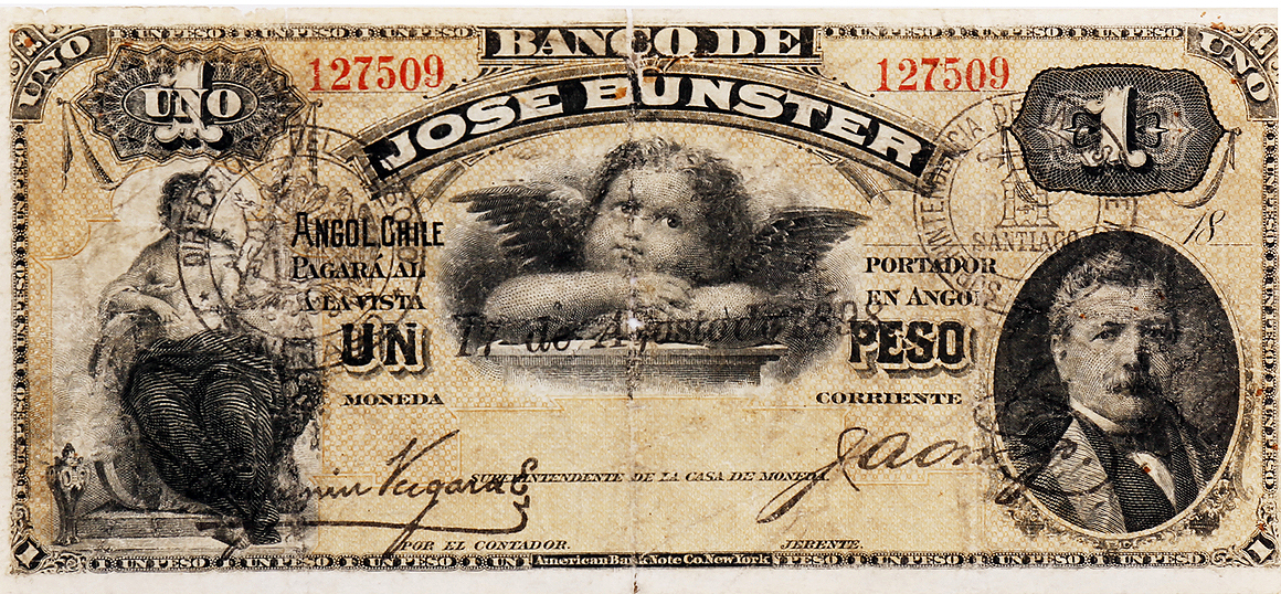 Entidad financiera que se instaló en la ciudad de Angol.